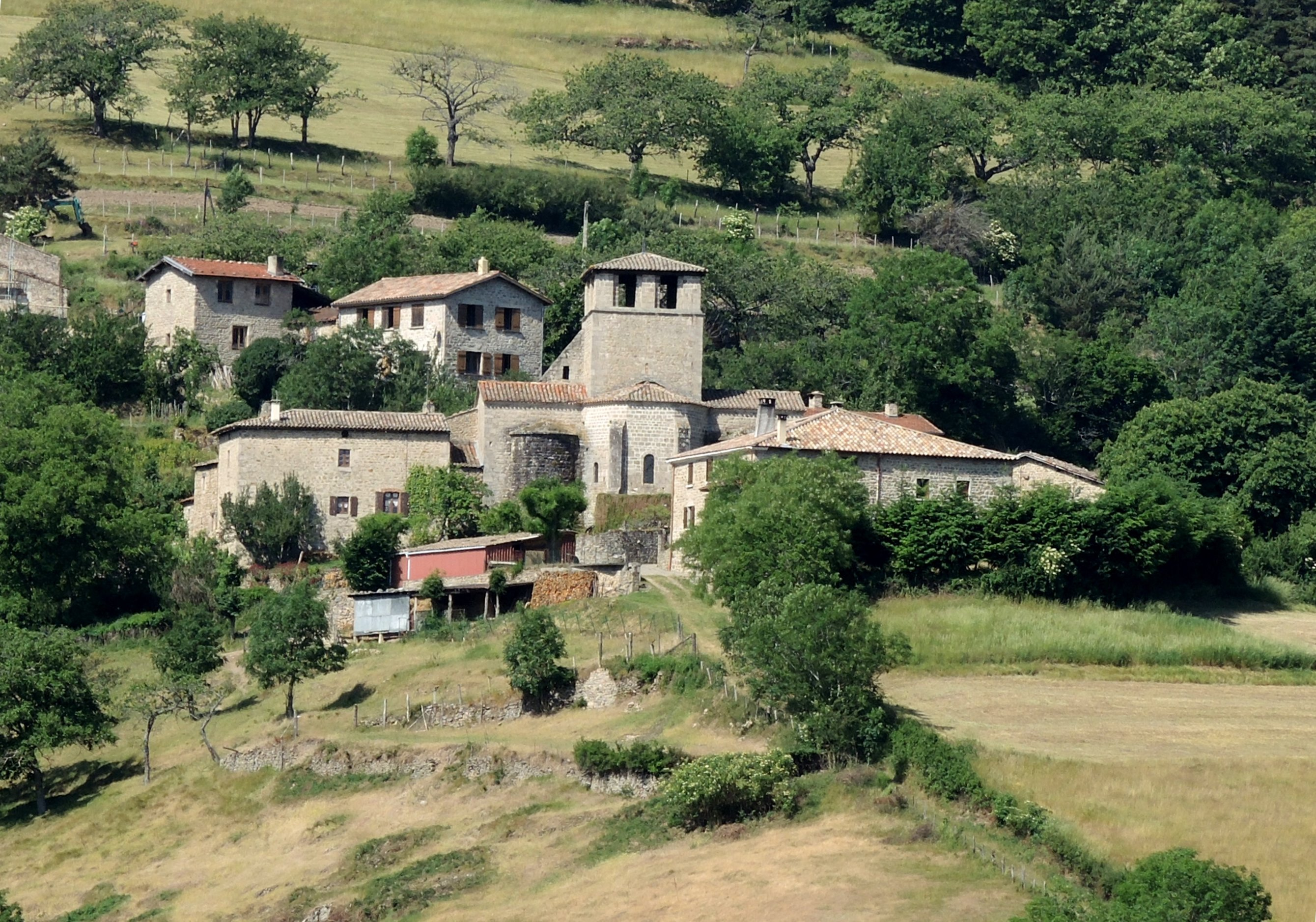 Veyrines St-Symphorien de Mahun hameau